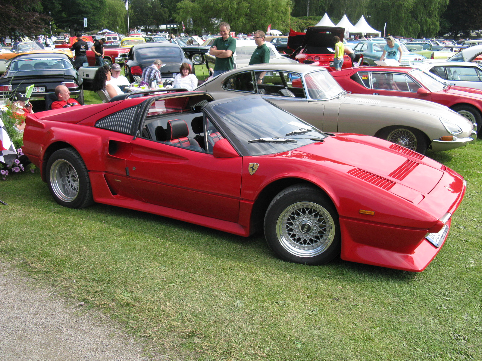 Ferrari 308 GTS Koenig Specials